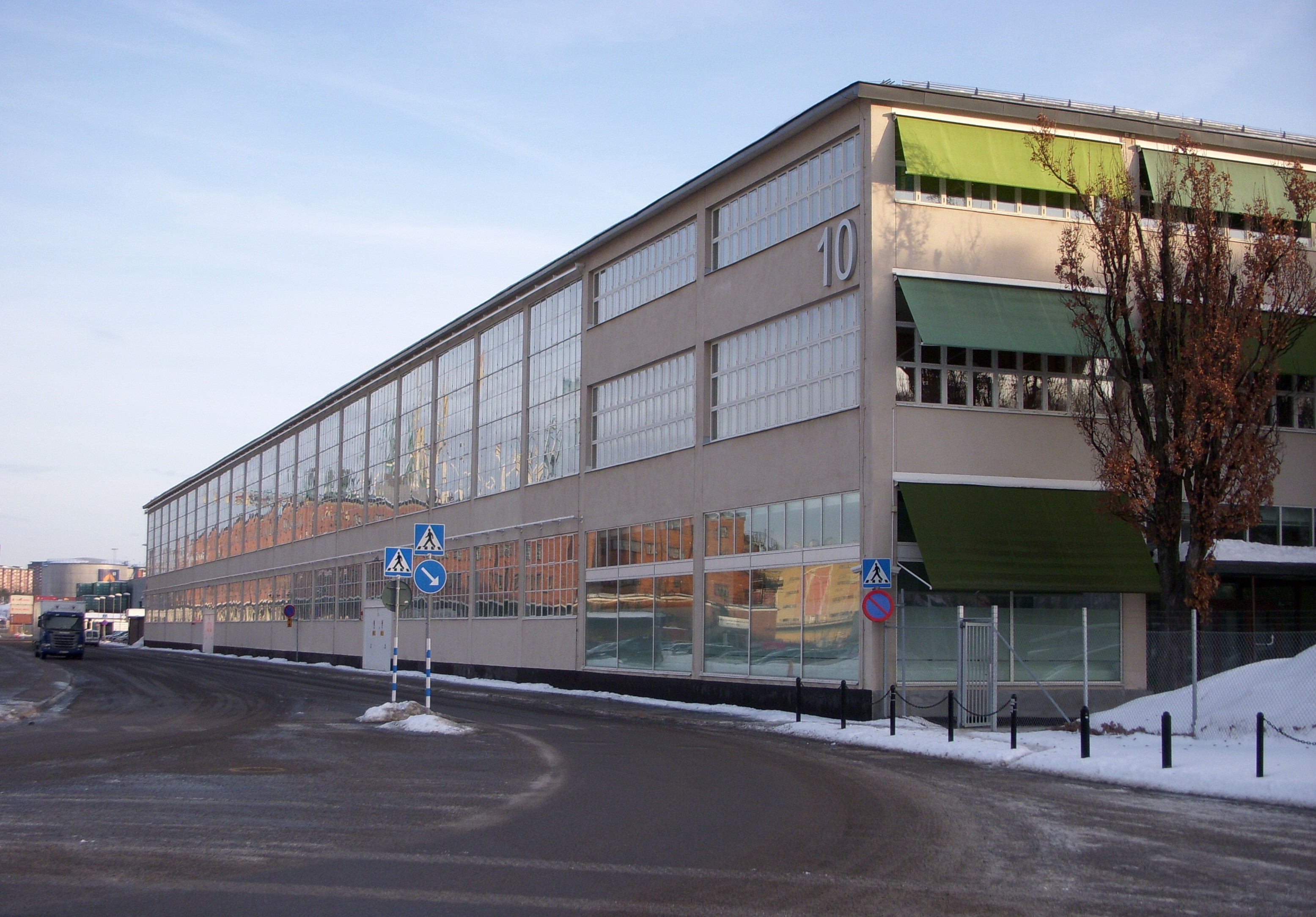 Stockholms Frihamn, f.d. Fordbyggnaden numera Magasin 10